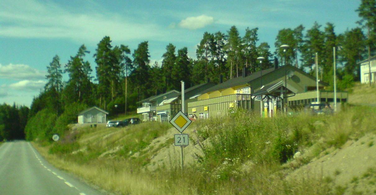 Setskog senter